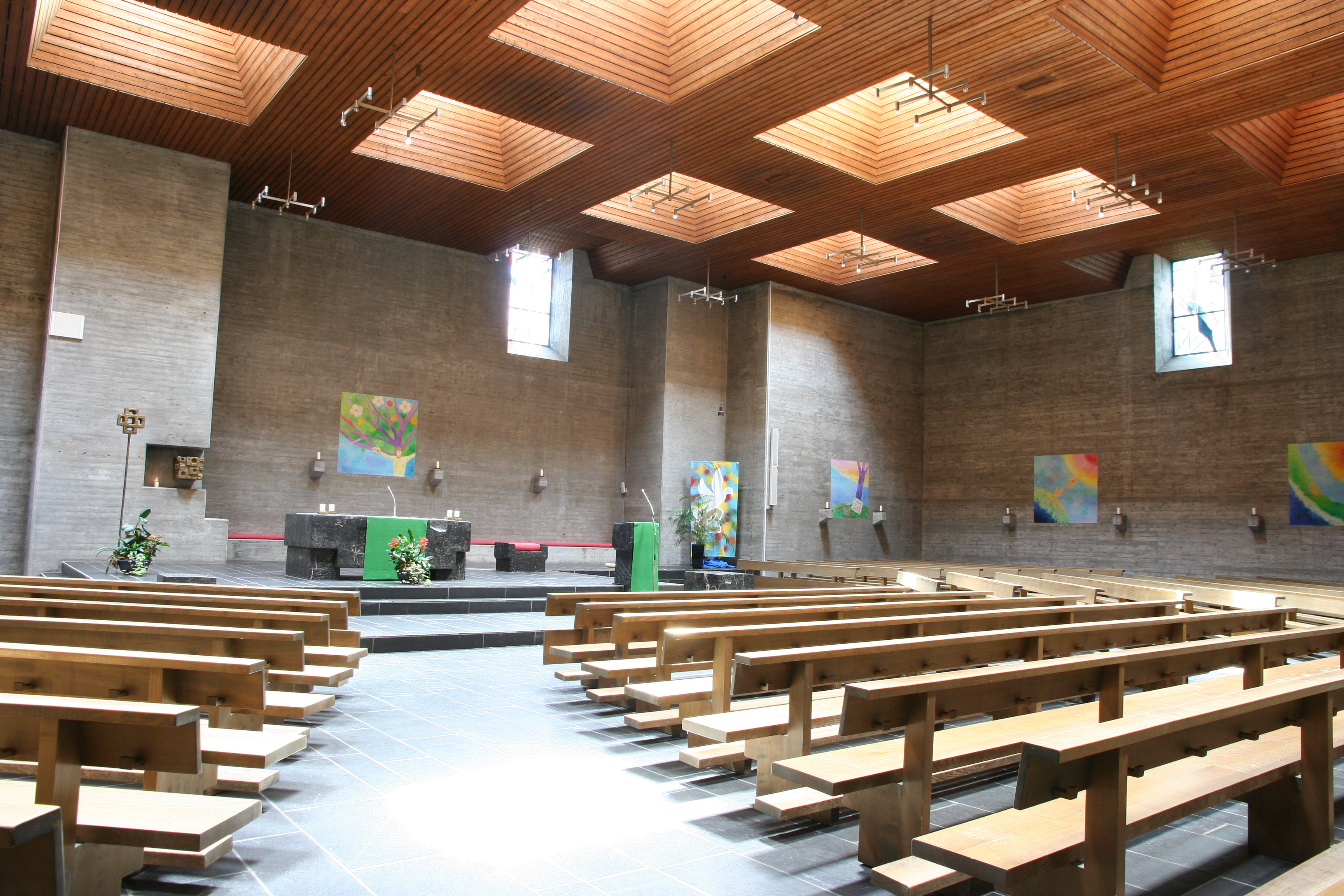 Römisch-katholische Pfarrkirche Christ König Biel/Bienne